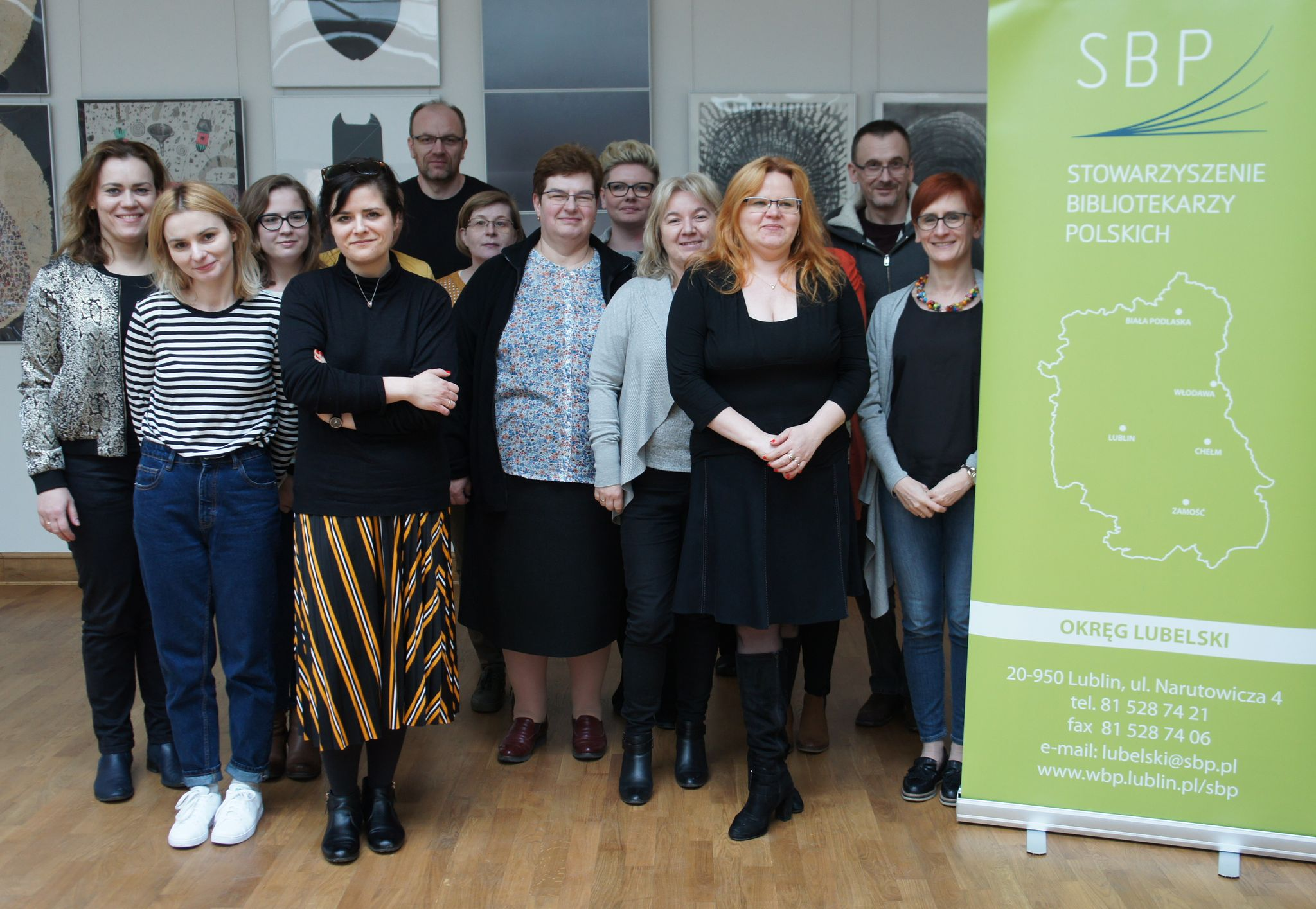 Szkolenie dla członków Stowarzyszenia Bibliotekarzy Polskich zorganizowane we współpracy Stowarzyszenia Wikimedia Polska i Okręgu Lubelskiego SBP. Lublin, 29 marca 2019.